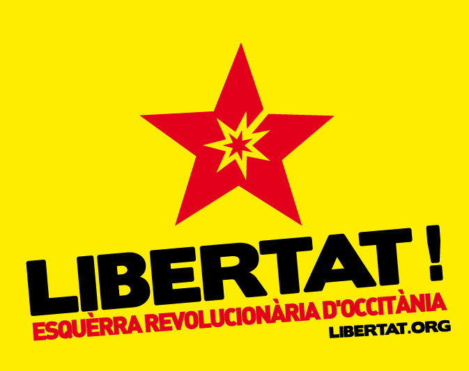 Logo du mouvement politique : Libertat, qui se bat pour la libération sociale et nationale du peuple en Occitanie et dans le monde.